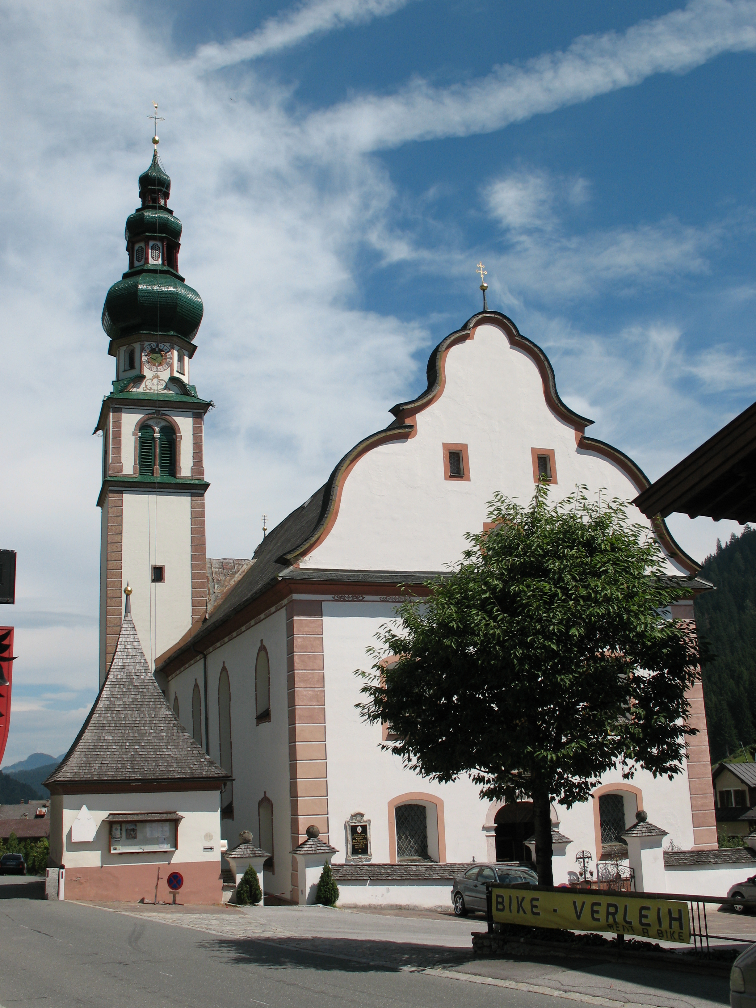 Kath. Pfarrkirche hl. Margaretha und Kriegerdenkmal